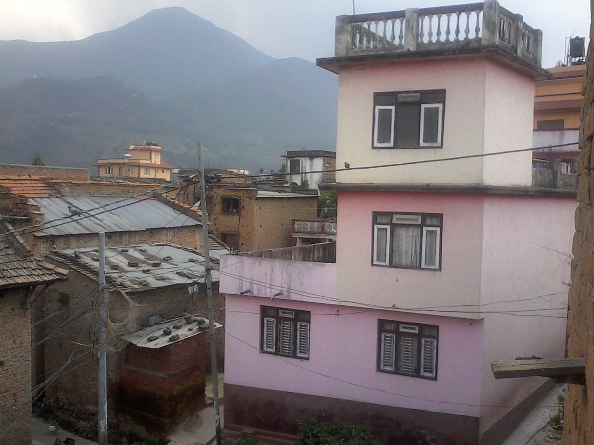 Modern House